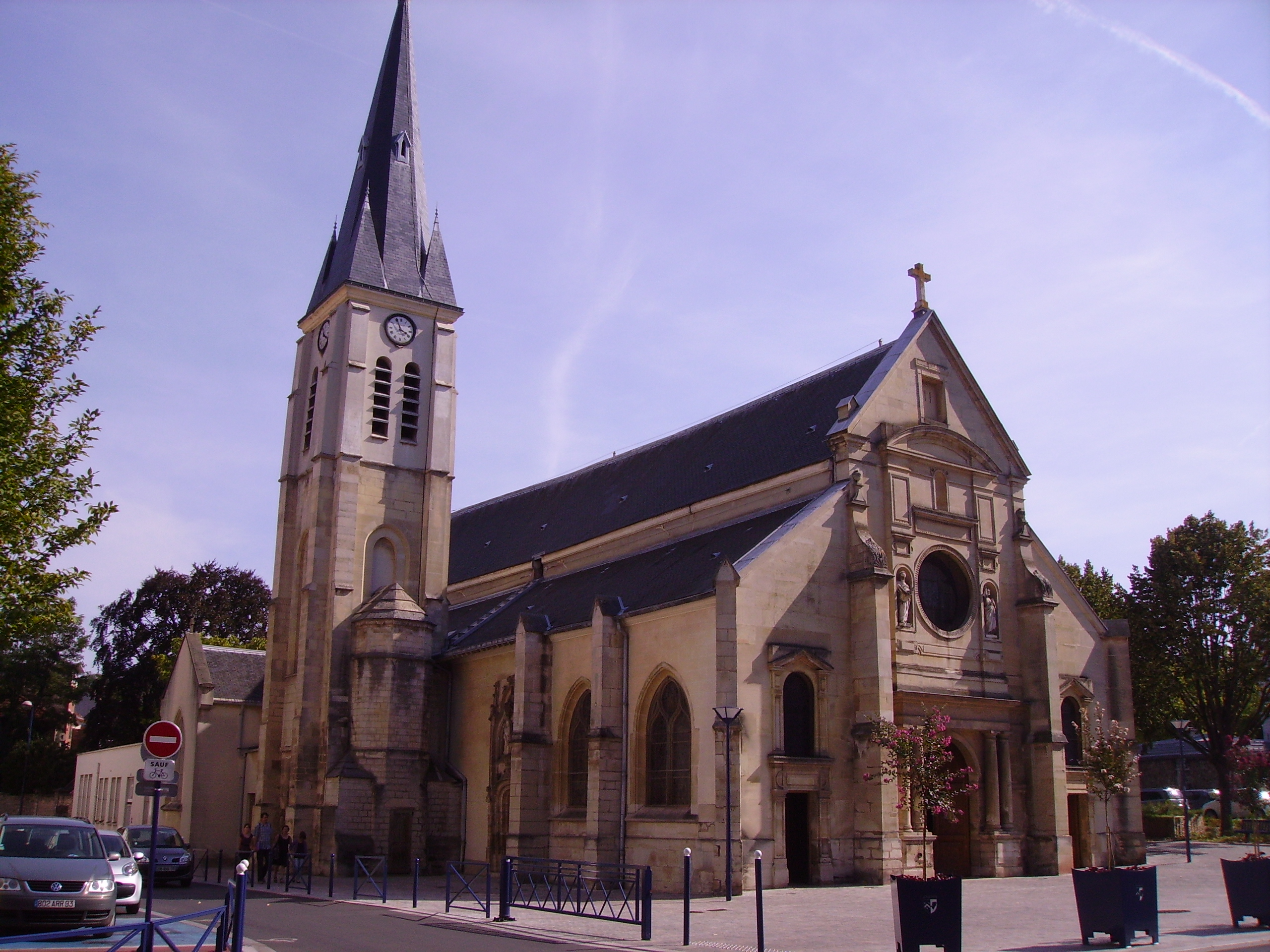 Église Saint-Pierre-Saint-Paul de Clamart